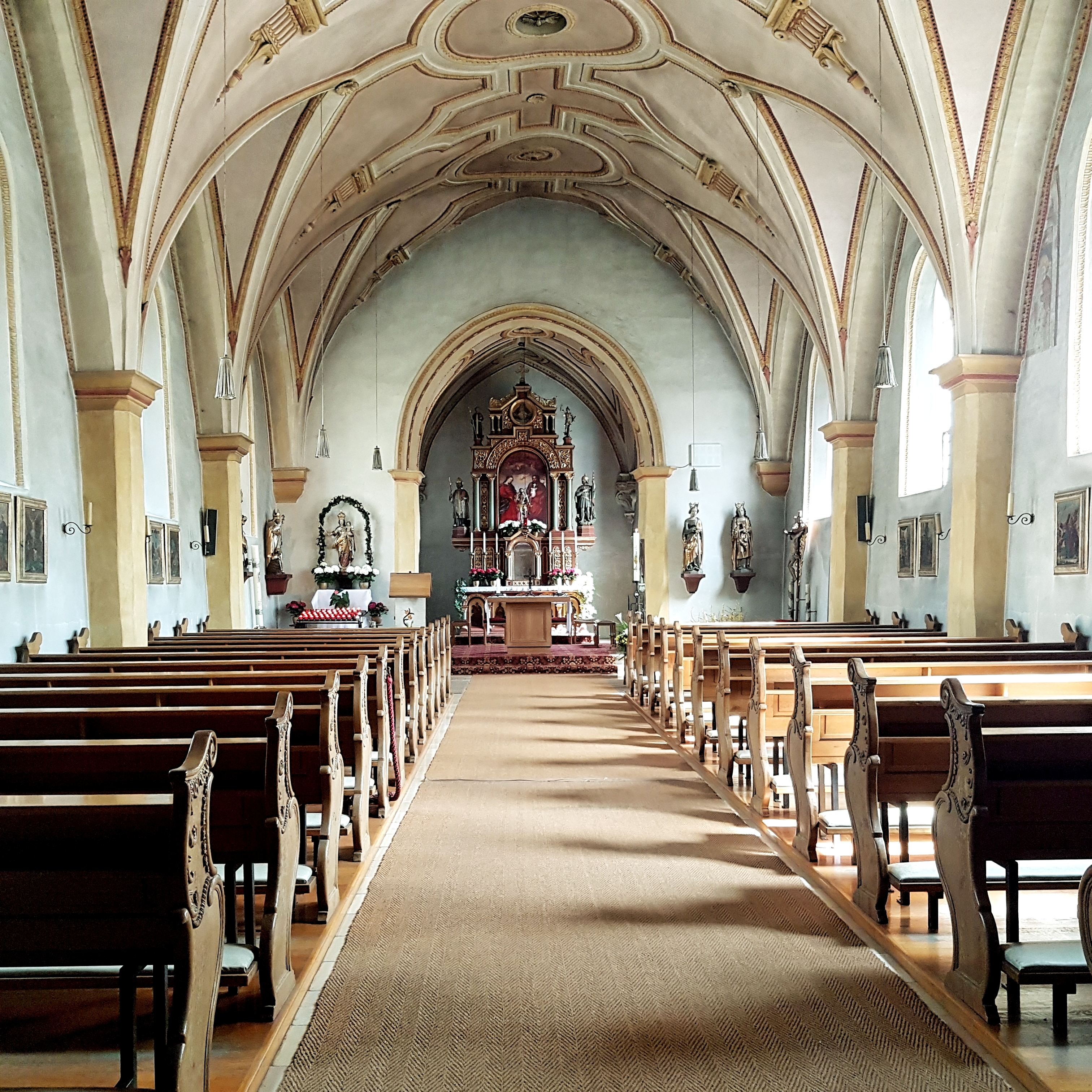 Sankt Korbinian (Unterhaching)